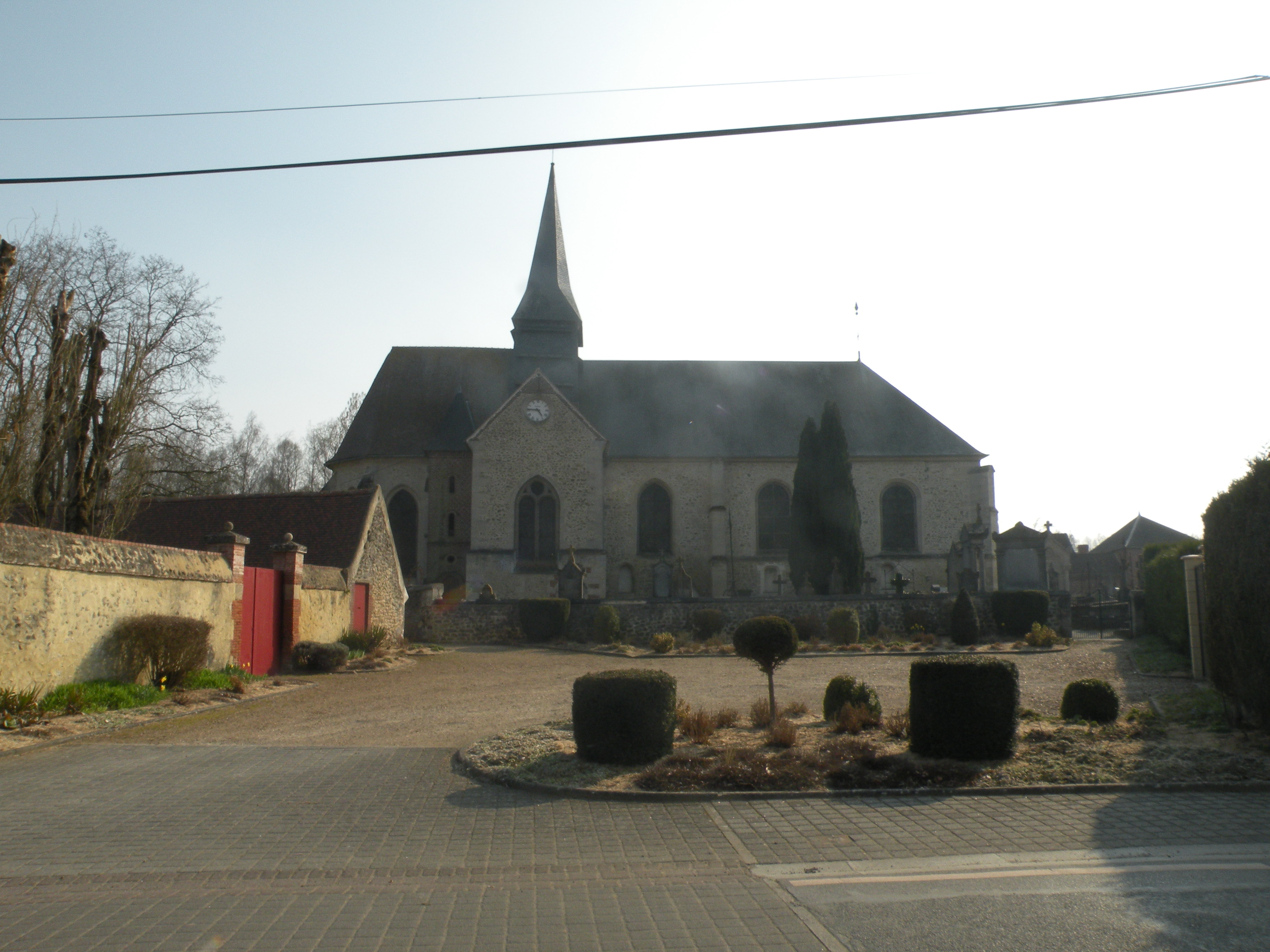 Église Saint-Lude de Bailleul-sur-Thérain.